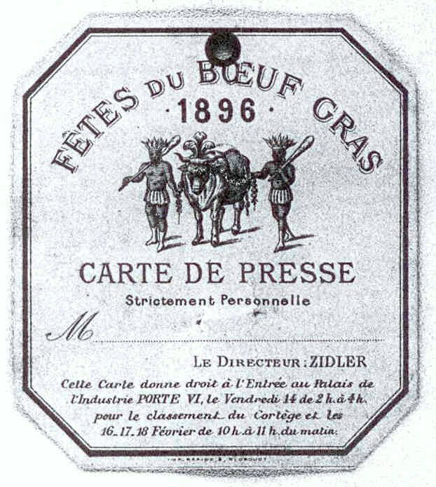 Carte de presse pour les fêtes du Bœuf Gras 1896.